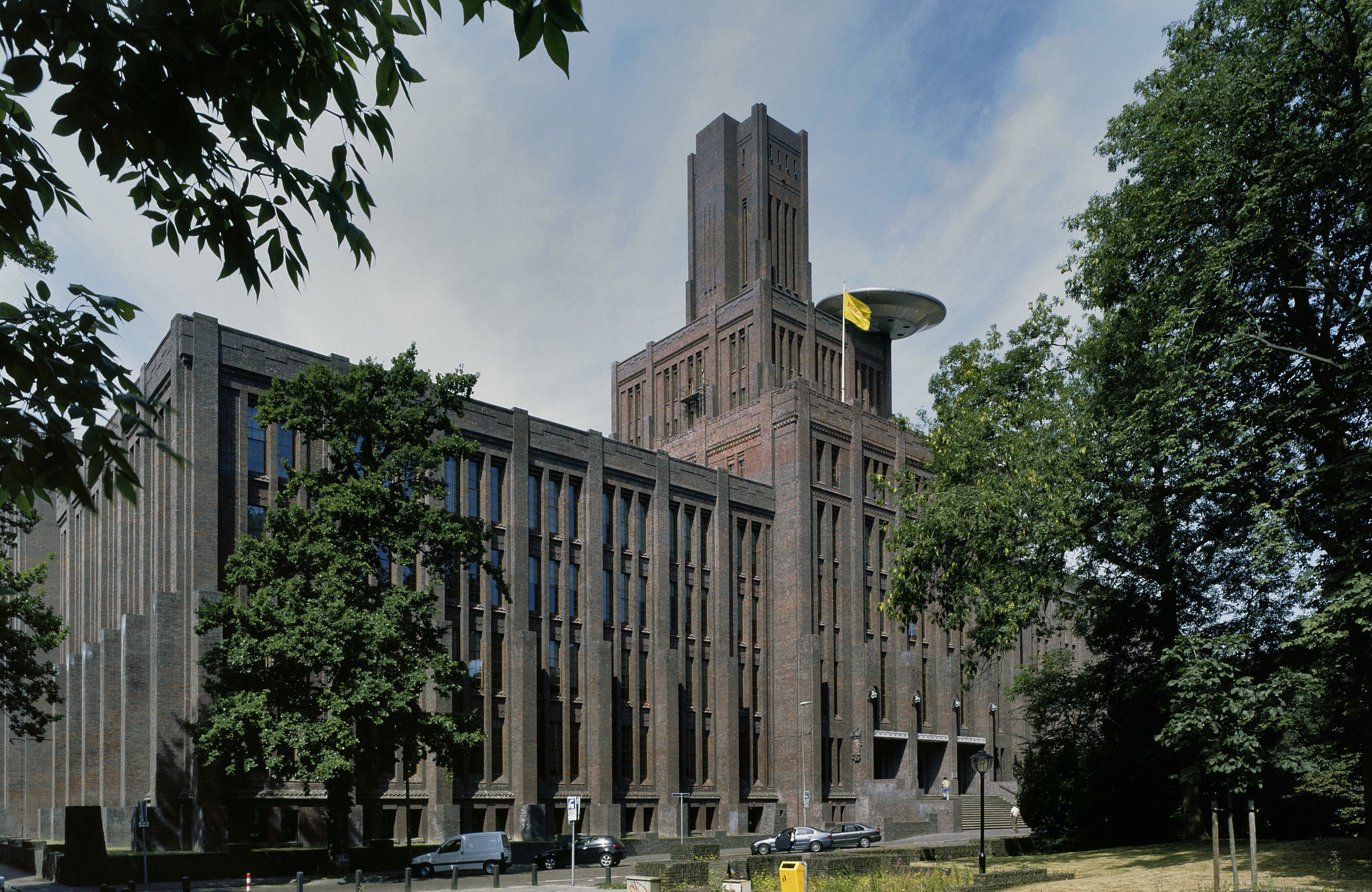 Hoofdgebouw Iii Nederlandse Spoorwegen - Oorlogsmonument: Voorzijde met kunstwerk 'De UFO' (opmerking: Gefotografeerd voor ANWB Monumentenboek)